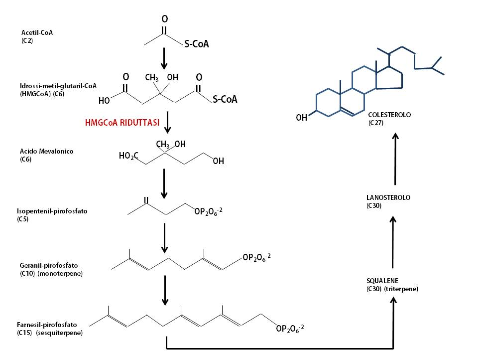 Sequenza della sintesi del colesterolo